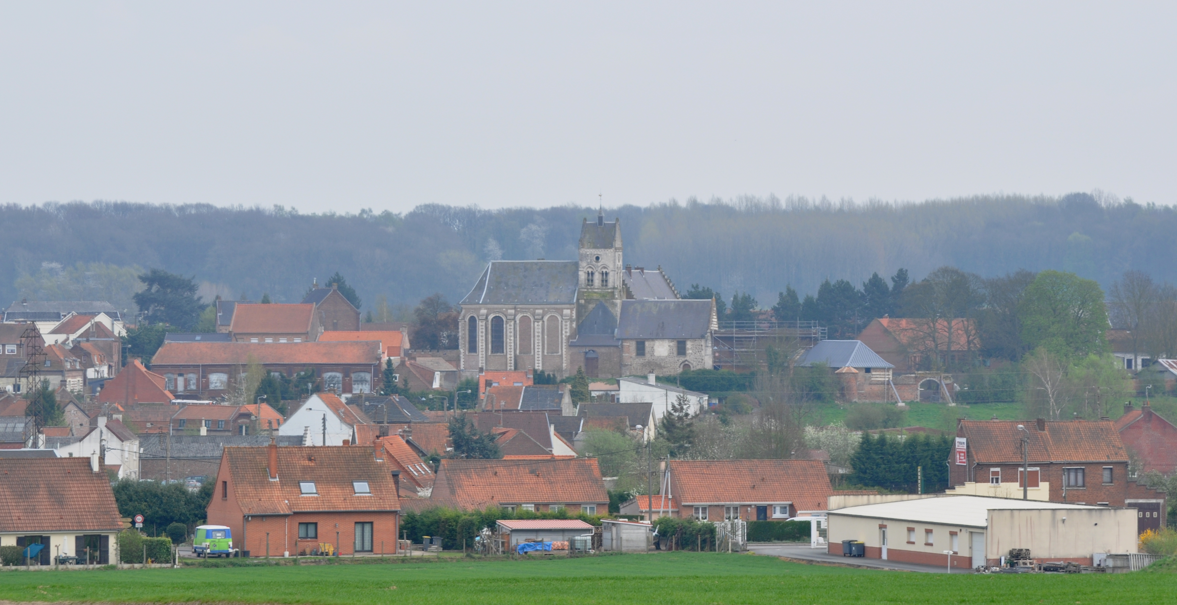 Vue sur le village de Labeuvrière, depuis les hauteurs nord